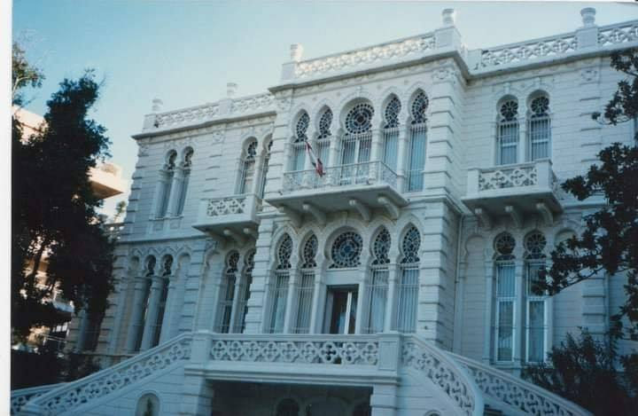 الواجهة الأمامية لمتحف سرسق، 1963